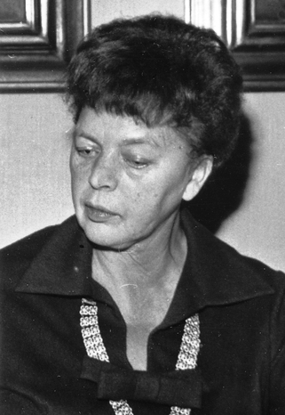 portrett, kvinne, forfatter, lyriker, sittende halvfigur.